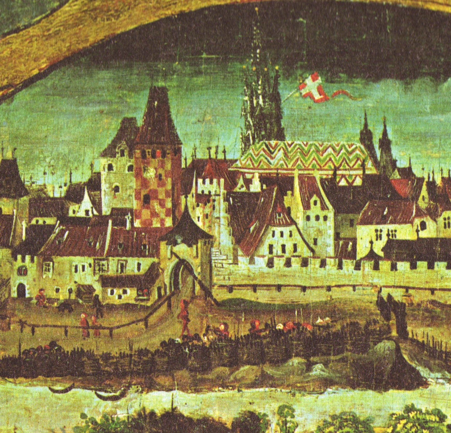 Wien, vom Donaukanal aus gesehen, um 1490. Zu sehen sind das Rotenturmtor der alten Stadtbefestigung, links dahinter der Rote Turm, rechts im Hintergrund der Stephansdom